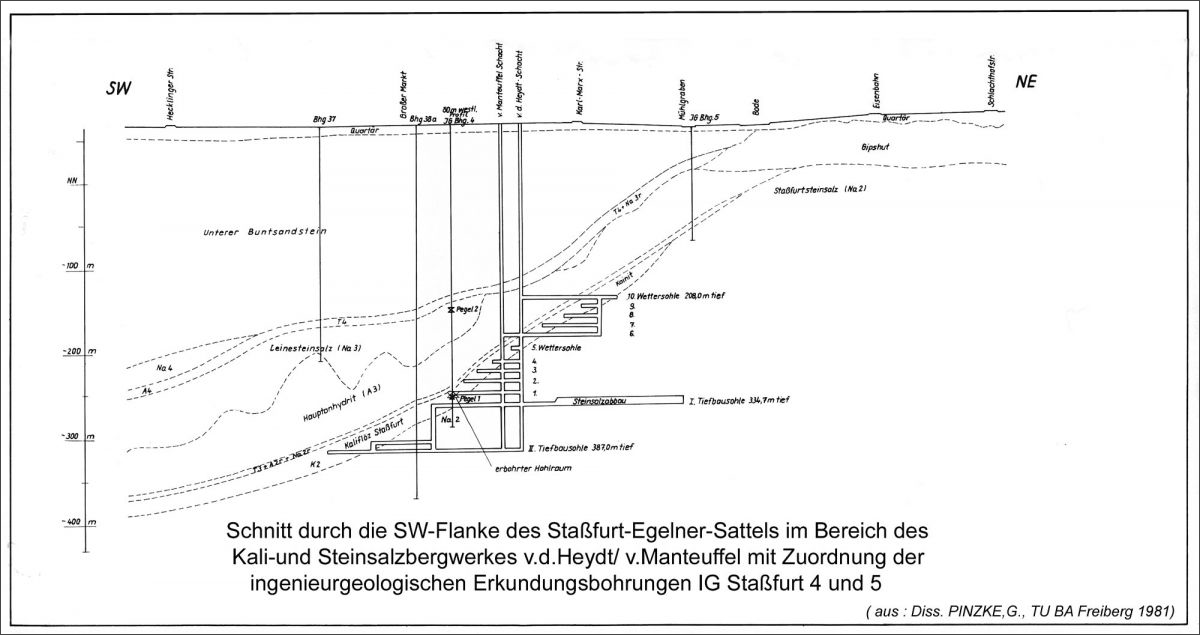 Schnitt durch die SW-Flanke des Staßfurt-Egelner-Sattels mit den ingenieurgeologischen Erkundungsbohrungen IG Staßfurt 4 und 5.